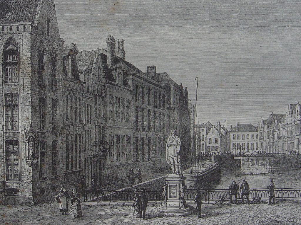 Bruges , Place de l'Académie par L.Clerget